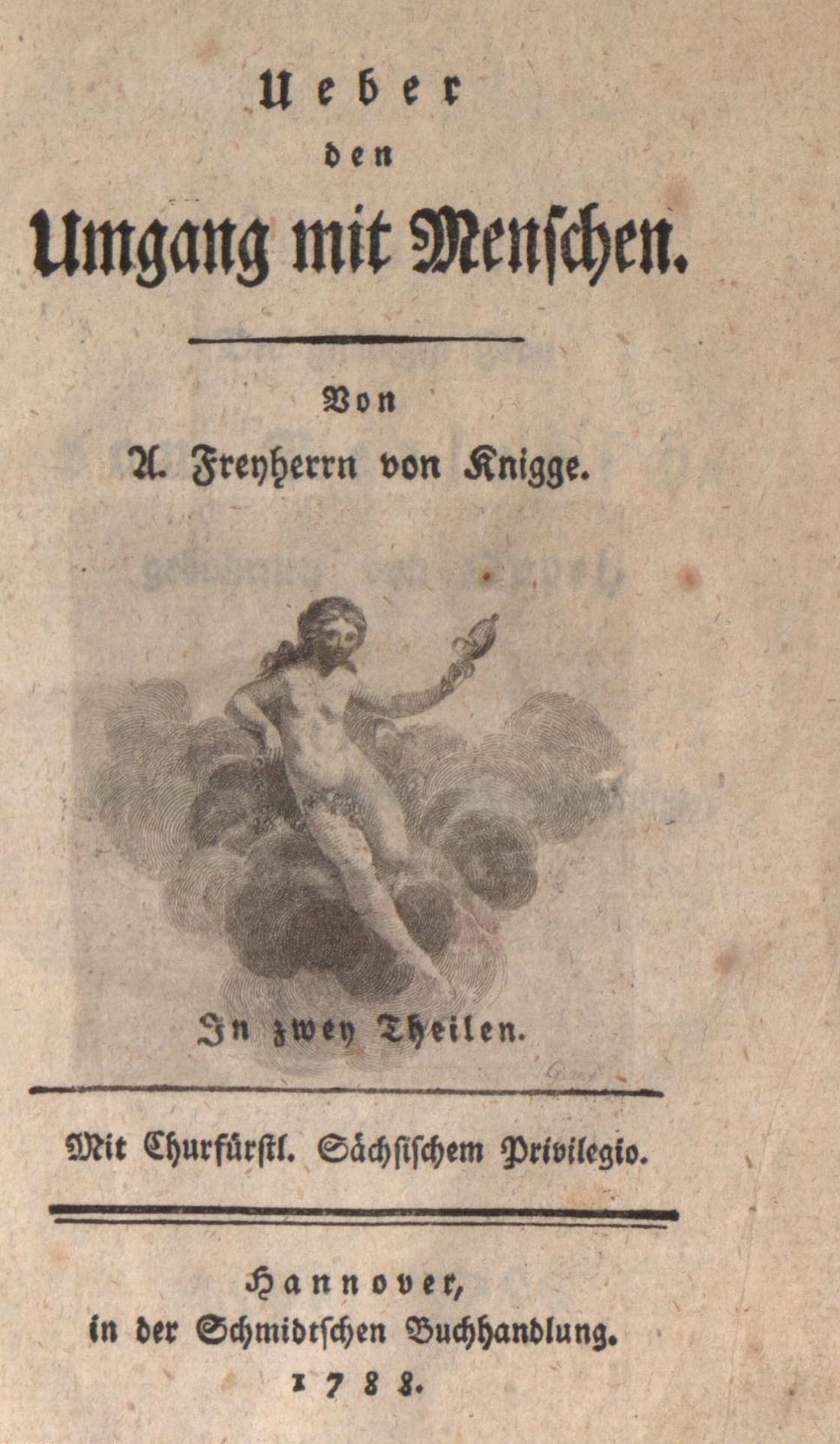 Titelblatt von Adolph Knigges Werk Über den Umgang mit Menschen (1. Band, 1. Auflage 1788)